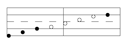 Die C-Dur-Tonleiter in der 6-plus-6-Notation nach Johannes Beyreuther. Für 6-plus-6-Instrumente, u. a. Janko-Klavier und Hayden-Duet-Konzertina, chromatisches Hackbrett, ...